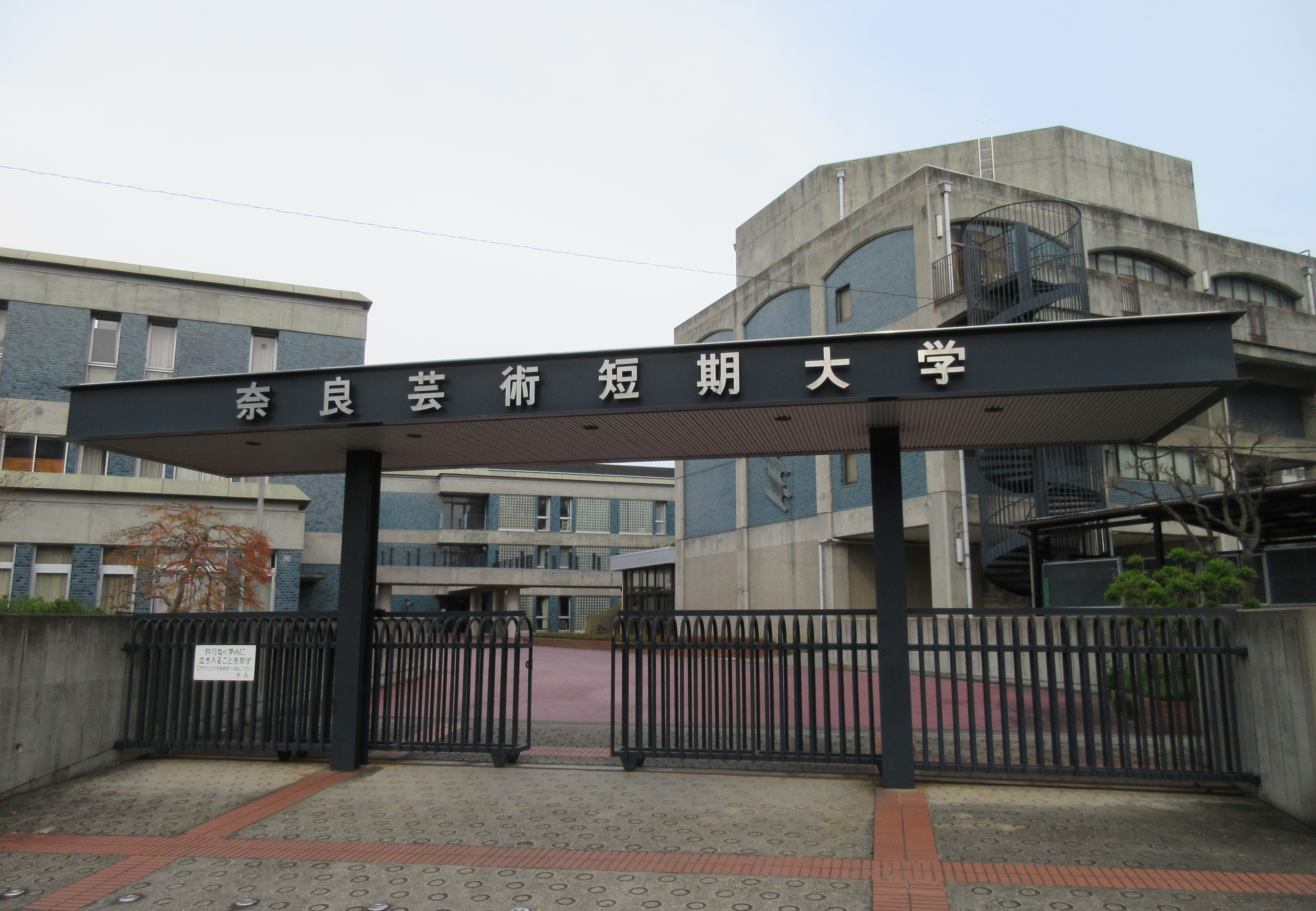 奈良芸術短期大学